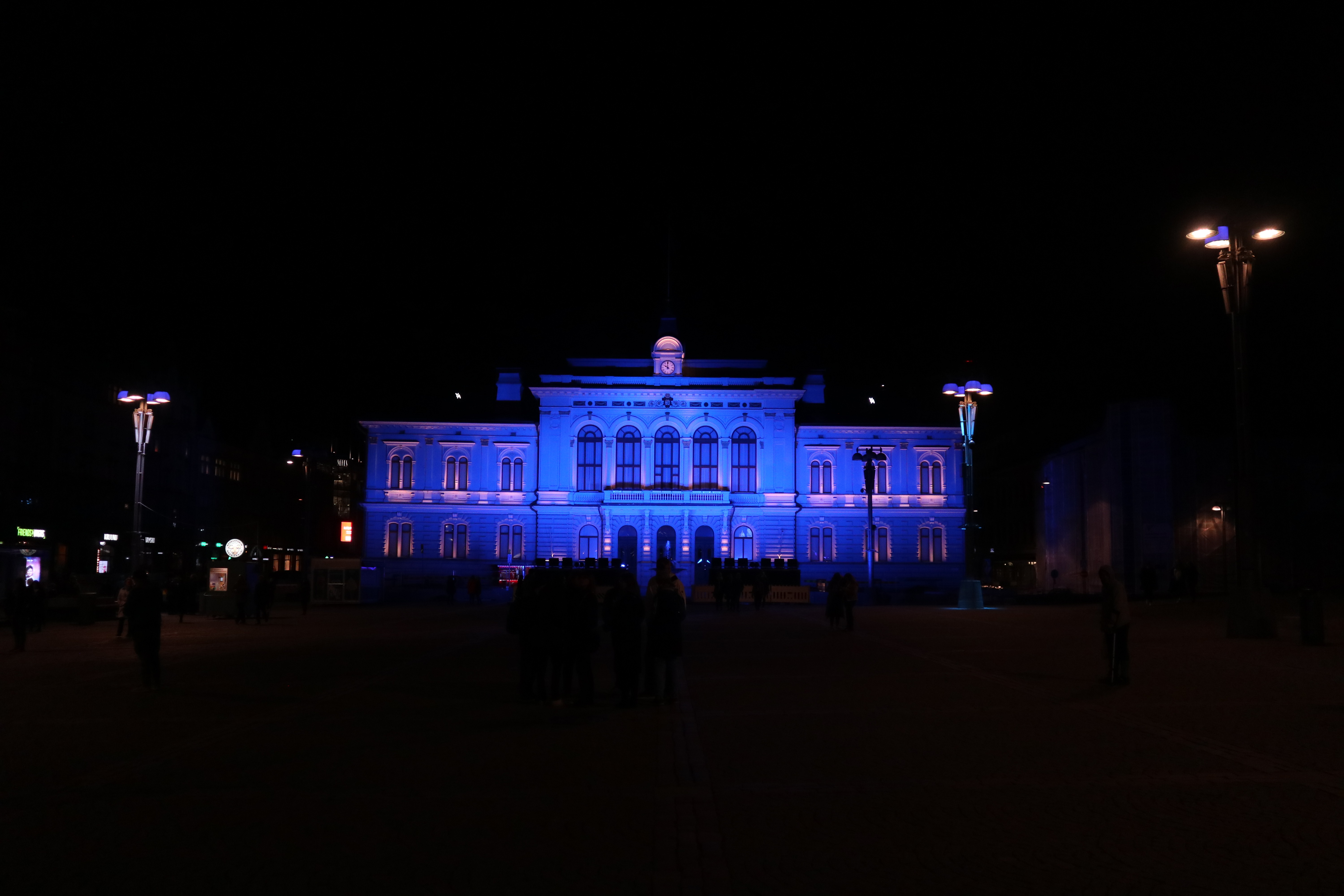 Tampereen Raatihuone